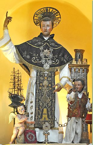 La statua di San Leonardo custodita nella chiesa parrocchiale di San Leonardo nell isola di Procida